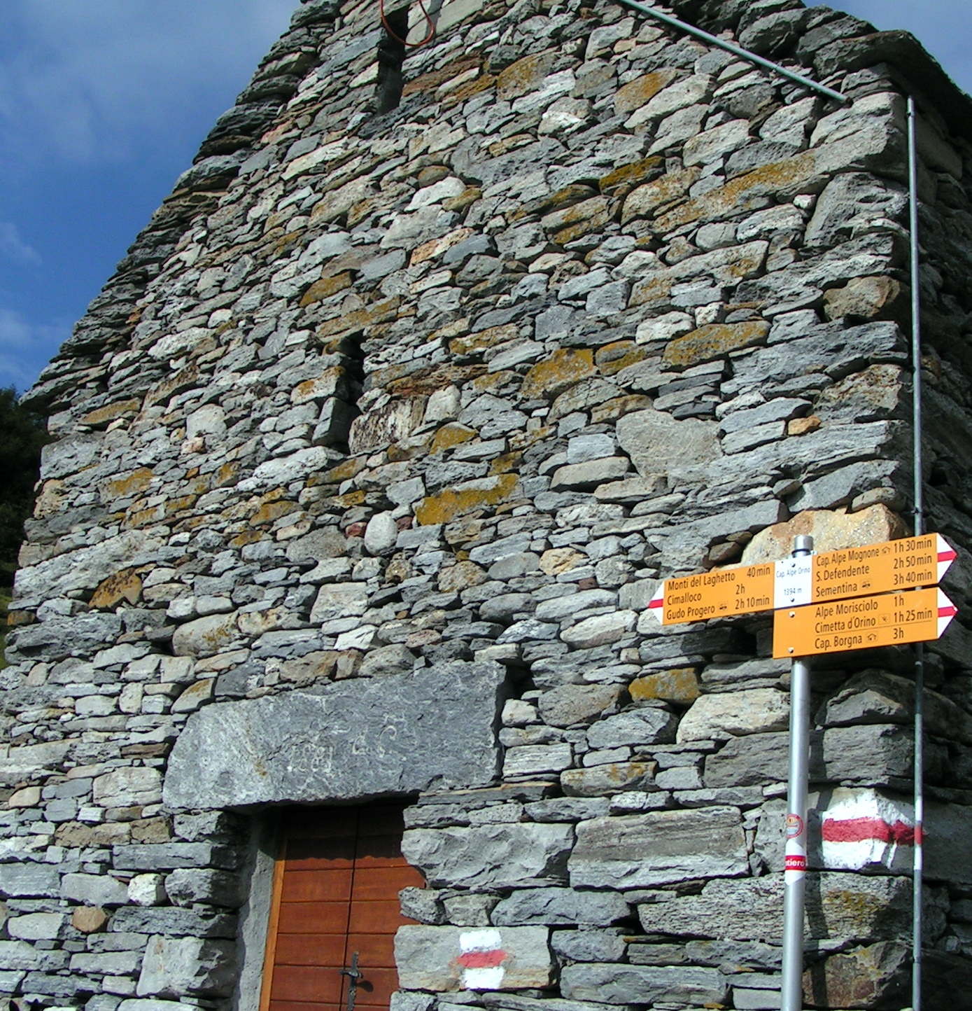 Capanna Orino nella valle di Gudo, Canton Ticino